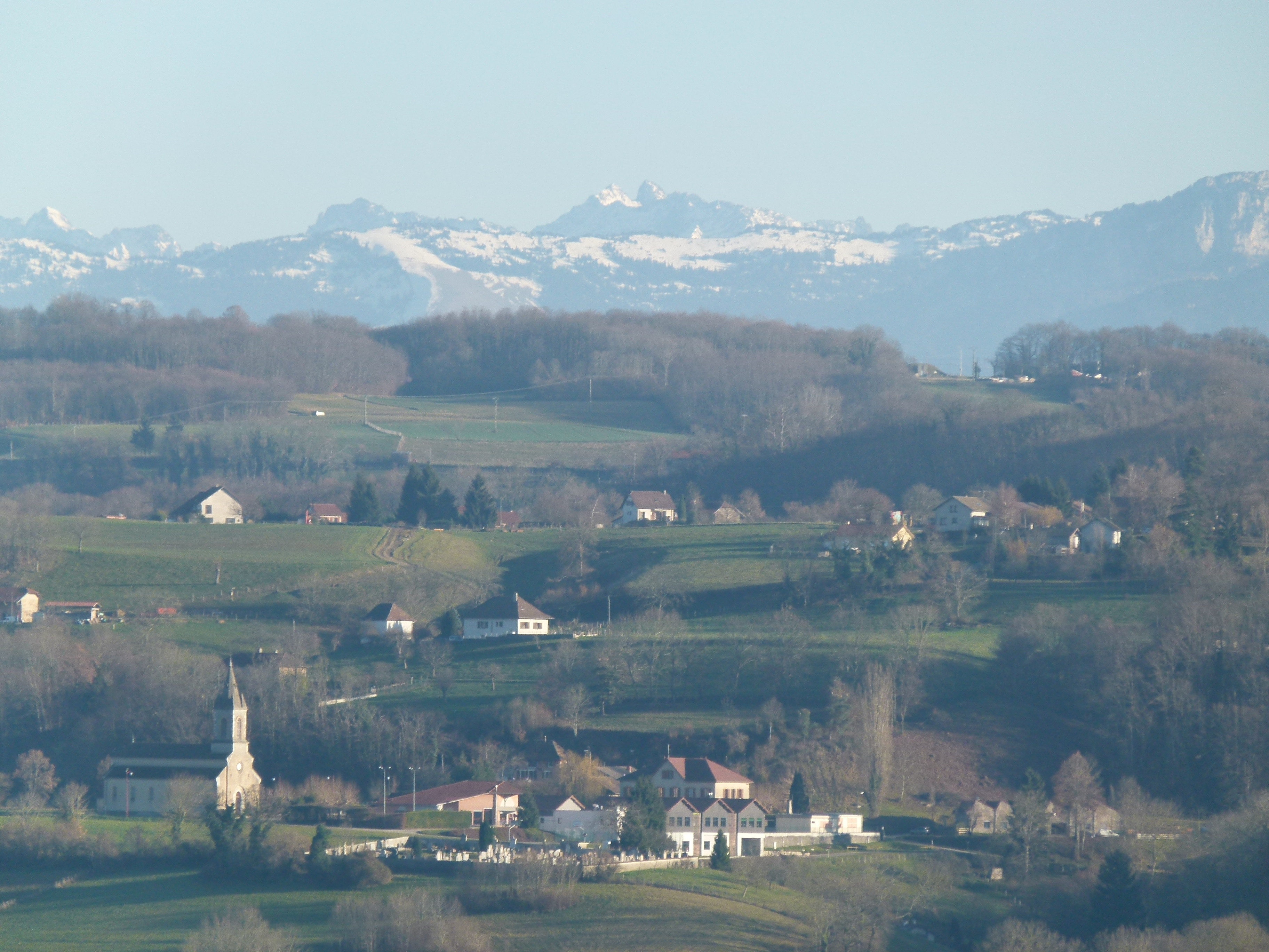 Notre village avec la chartreuse en arrière plan